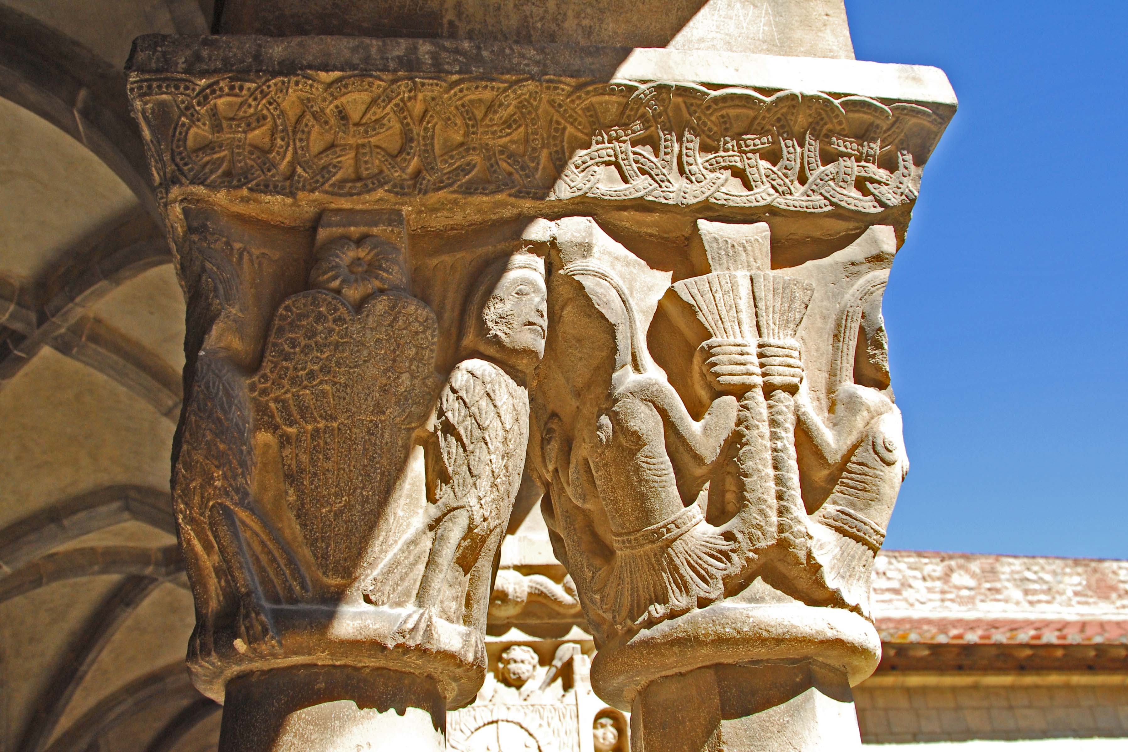 Ste-Eulalie-et-Ste-Julie_d’Elne, Pfeilerkapitell Westgalerie, Adler und Sirene